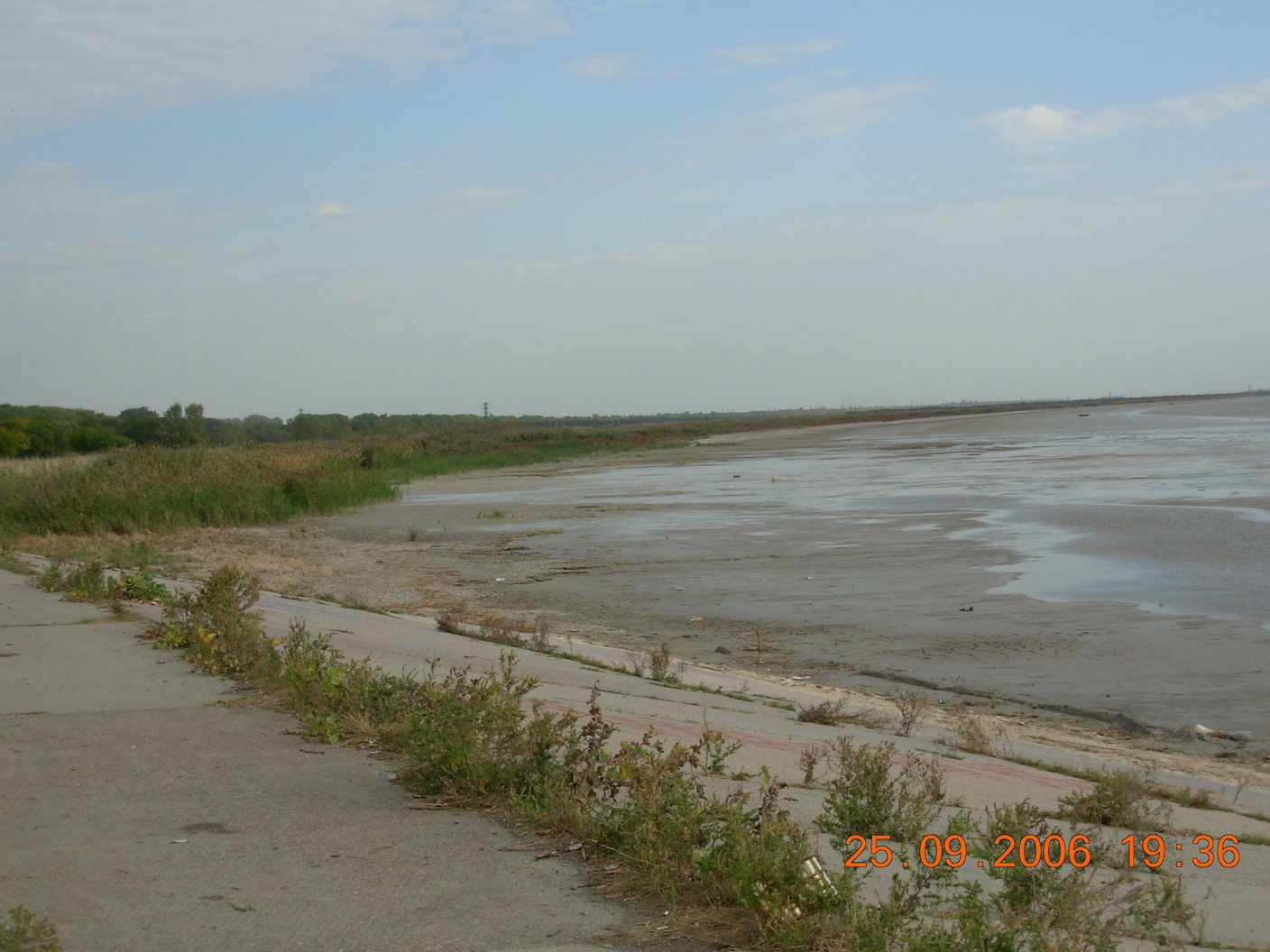 Побережье Таганрогского залива со стороны Новоазовска (бывший пляж).